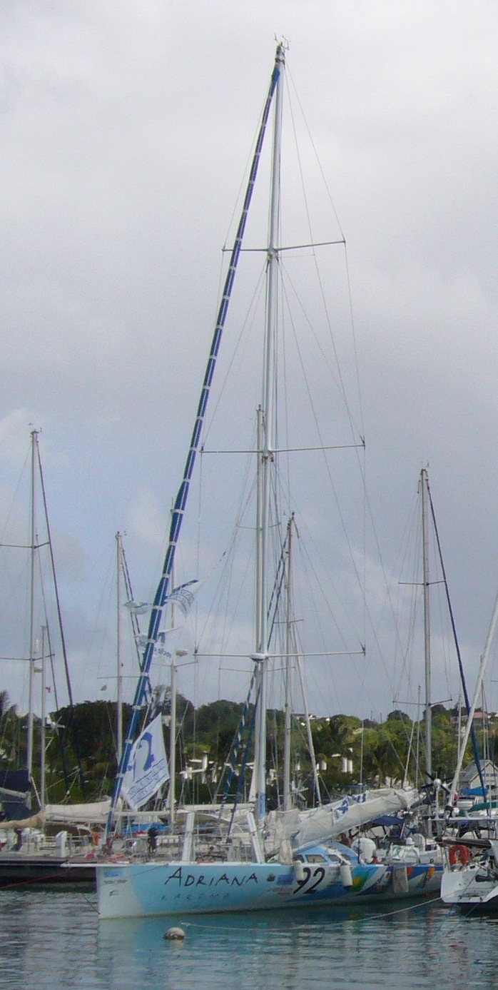 IMOCA 92-Adriana Karembeu, skippé par Philippe Fiston, est notamment connu pour être le Géodis de Christophe Auguin, avec lequel il remporte le BOC Challenge 1994 et le Vendée Globe 1996. Marina Bas-du-Fort, Pointe-à-Pitre, Guadeloupe.